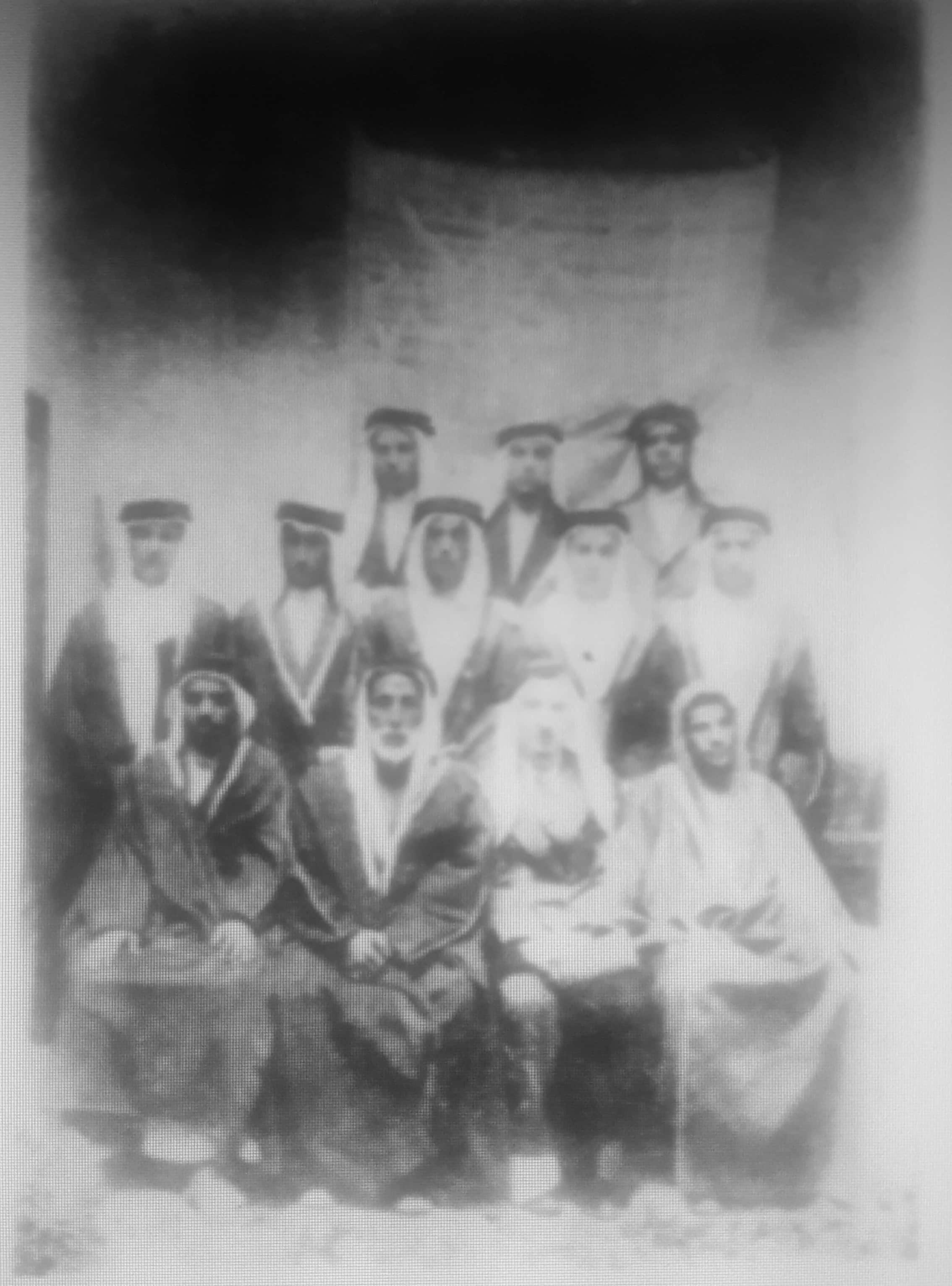 صورة تخرج دفعة عمر السقاف